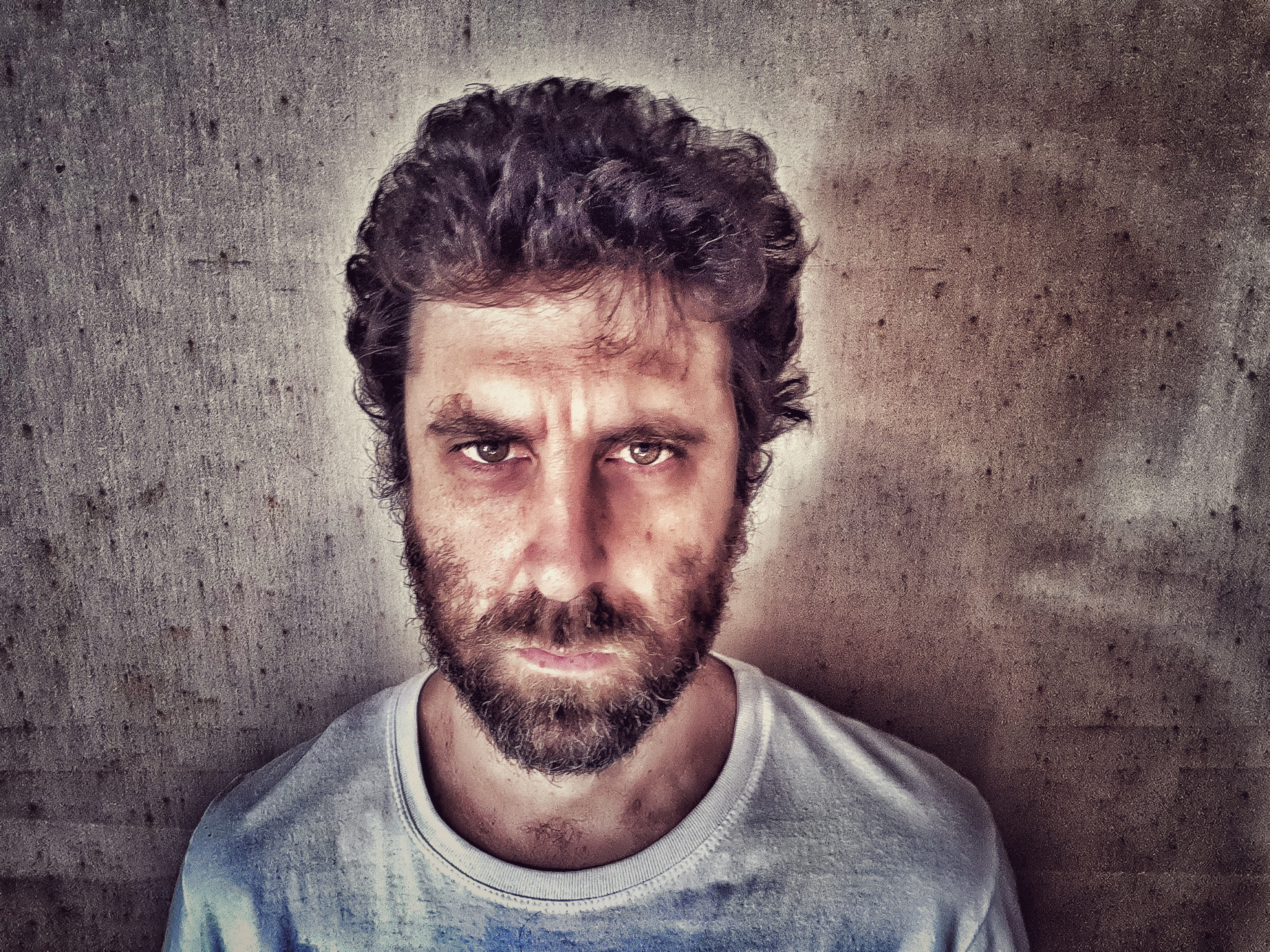 Selfie feita por Craca durante a pandemia em sua casa